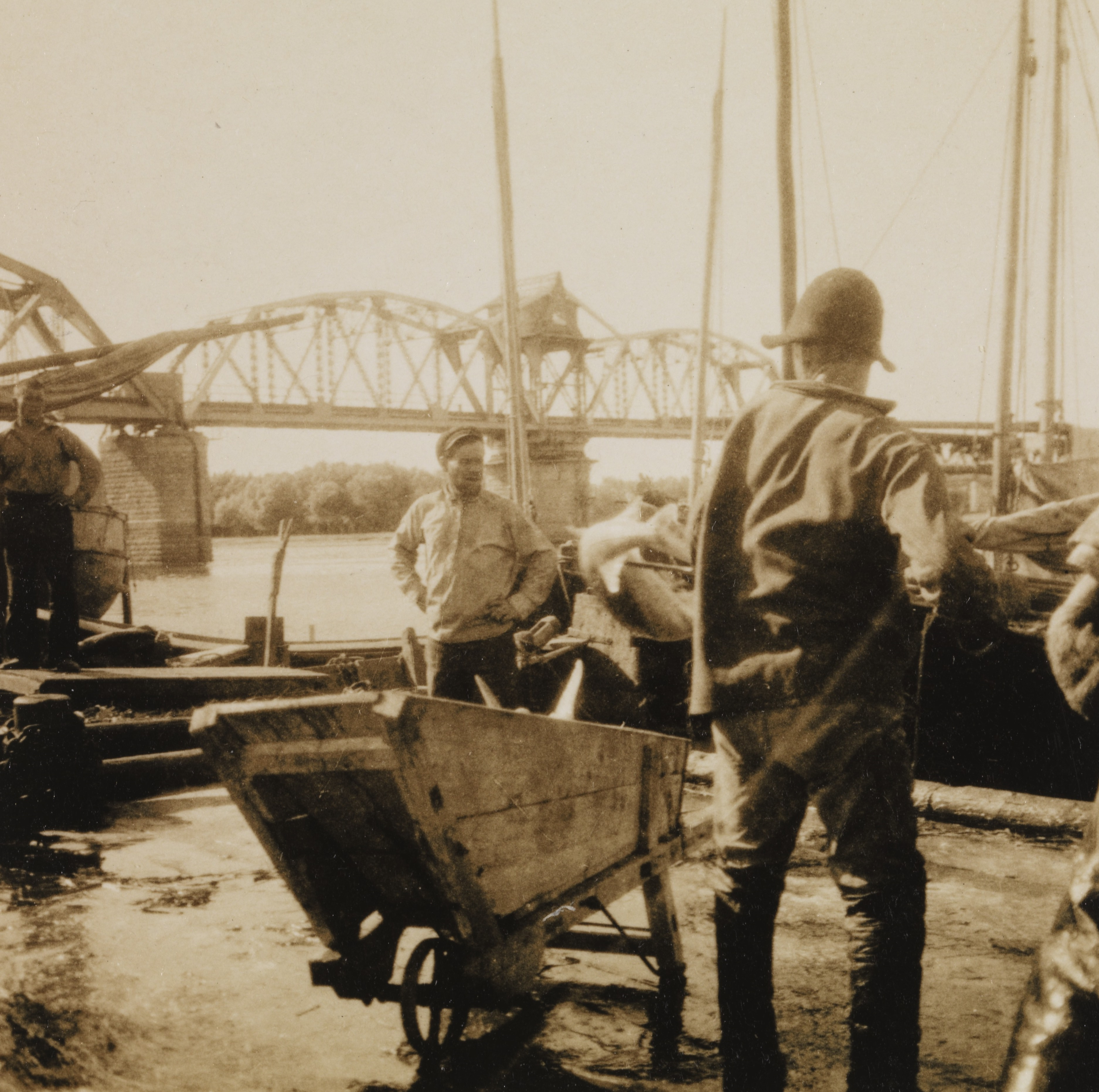 Havnearbeidere fyller opp en trillebår med fisk til fryseriet. Ett av bildene fra reisen gjennom Georgia i perioden 3 juli til 14 juli 1925. Fridtjof Nansen ble invitert av republikkens president som ba ham om å reise rundt for å undersøke forholdene i landet slik at han kunne gi råd om utviklingsmulighetene. Depicted place: Russland, Astrachan'